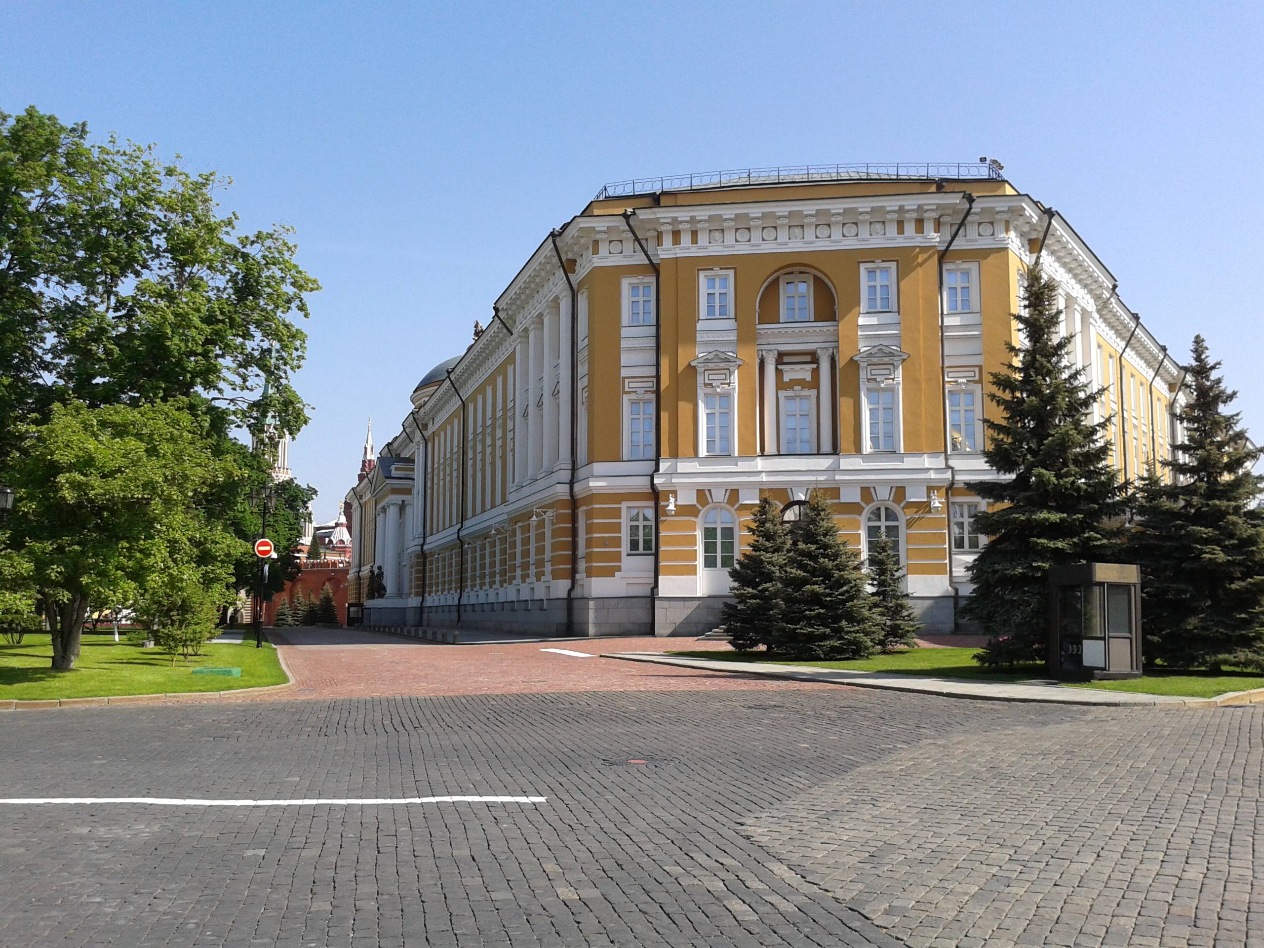 Московский Кремль. Здание Сената